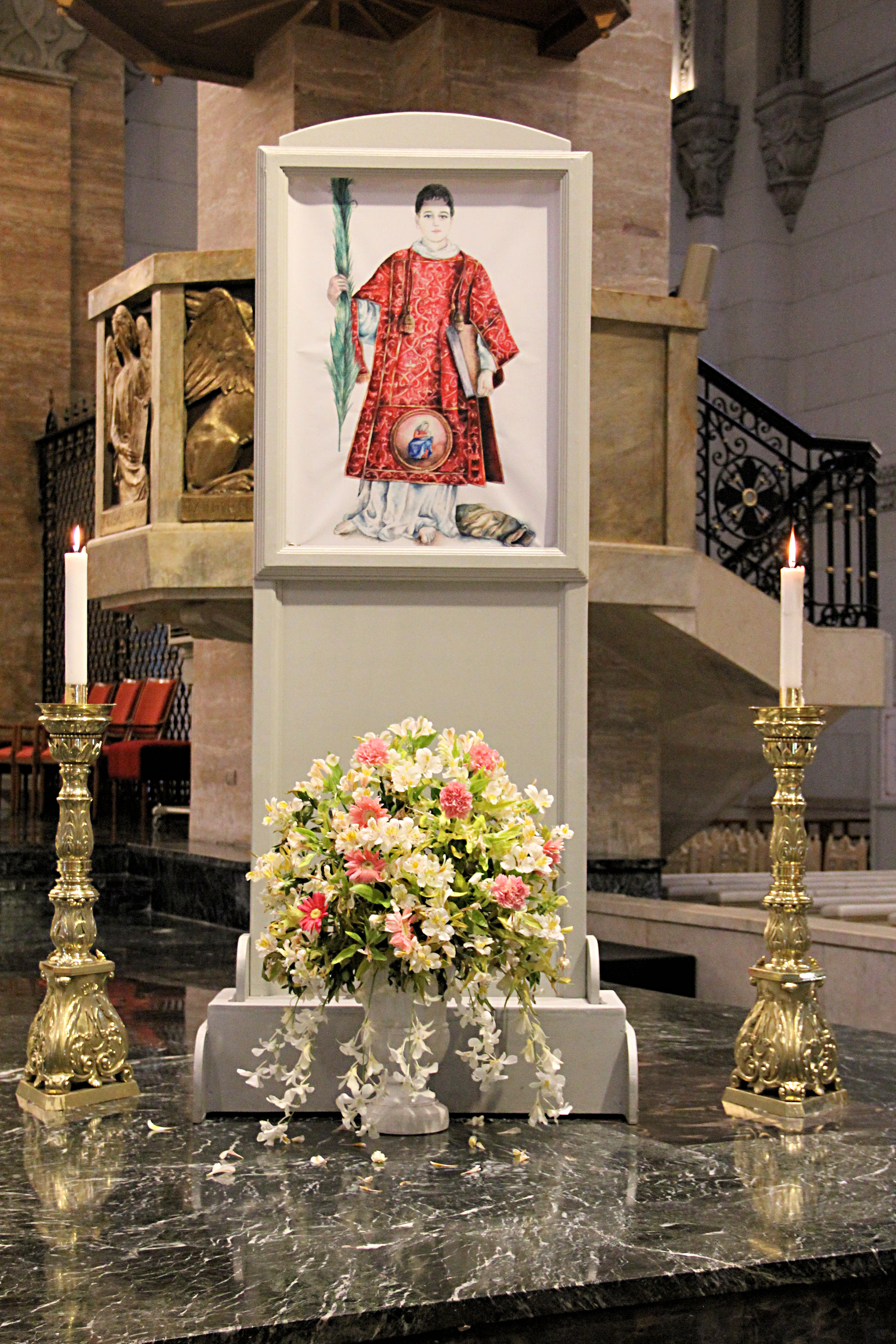 L'icona di San Cesario diacono e martire, opera dell'artista Giovanni Guida, esposta sull'altare maggiore della Cattedrale di Manila (Minor Basilica and Metropolitan Cathedral of the Immaculate Conception, Manila, Philippines)